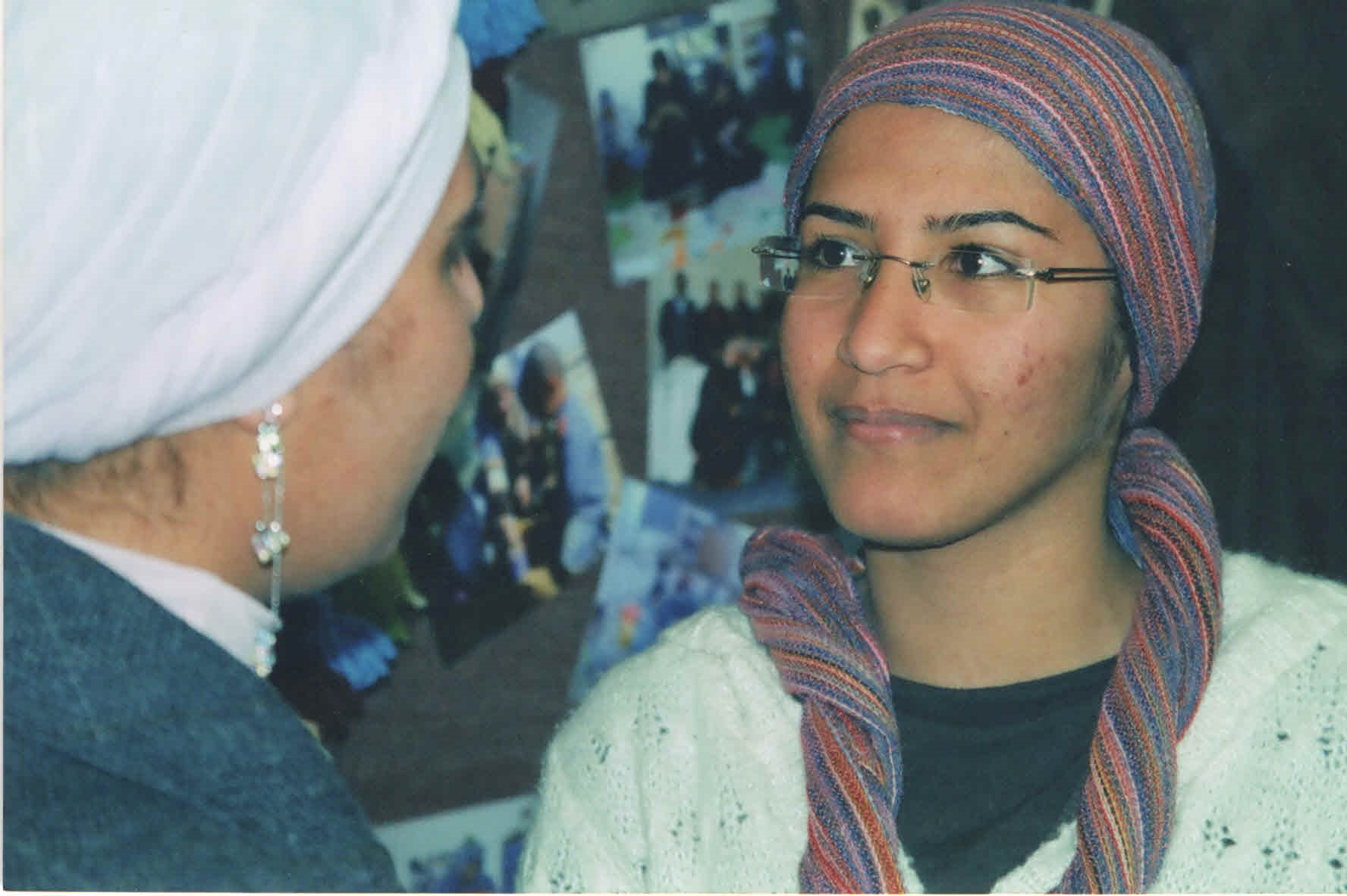 בדרכים עקלקלות